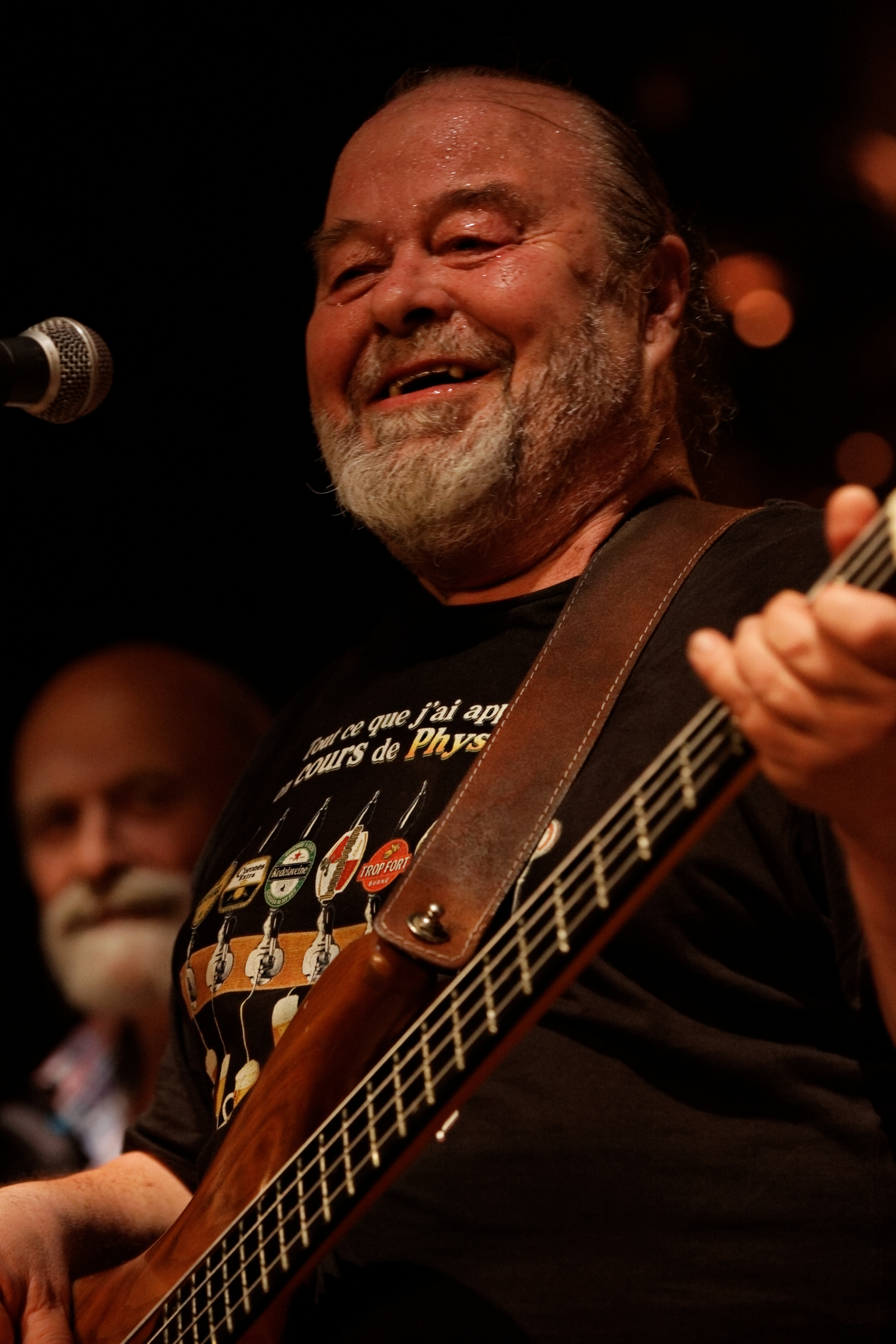 Les Sonerien Du fêtent leurs 40 ans en concert à l'espace Gradlon lors du festival de Cornouaille 2012.